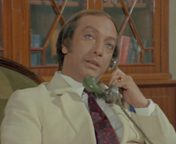 Franco Ressel in a scene of the film Il ragazzo che sorride